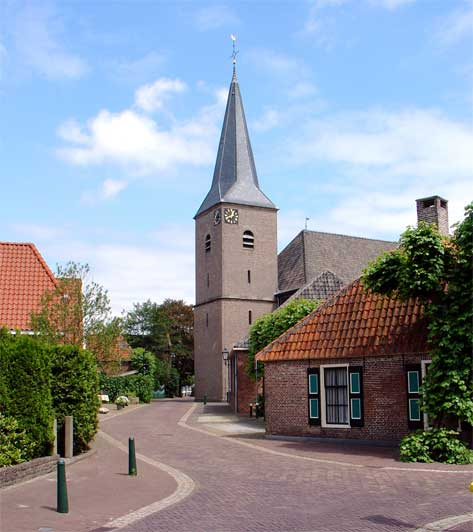 De kerk van Gramsbergen in Overijssel